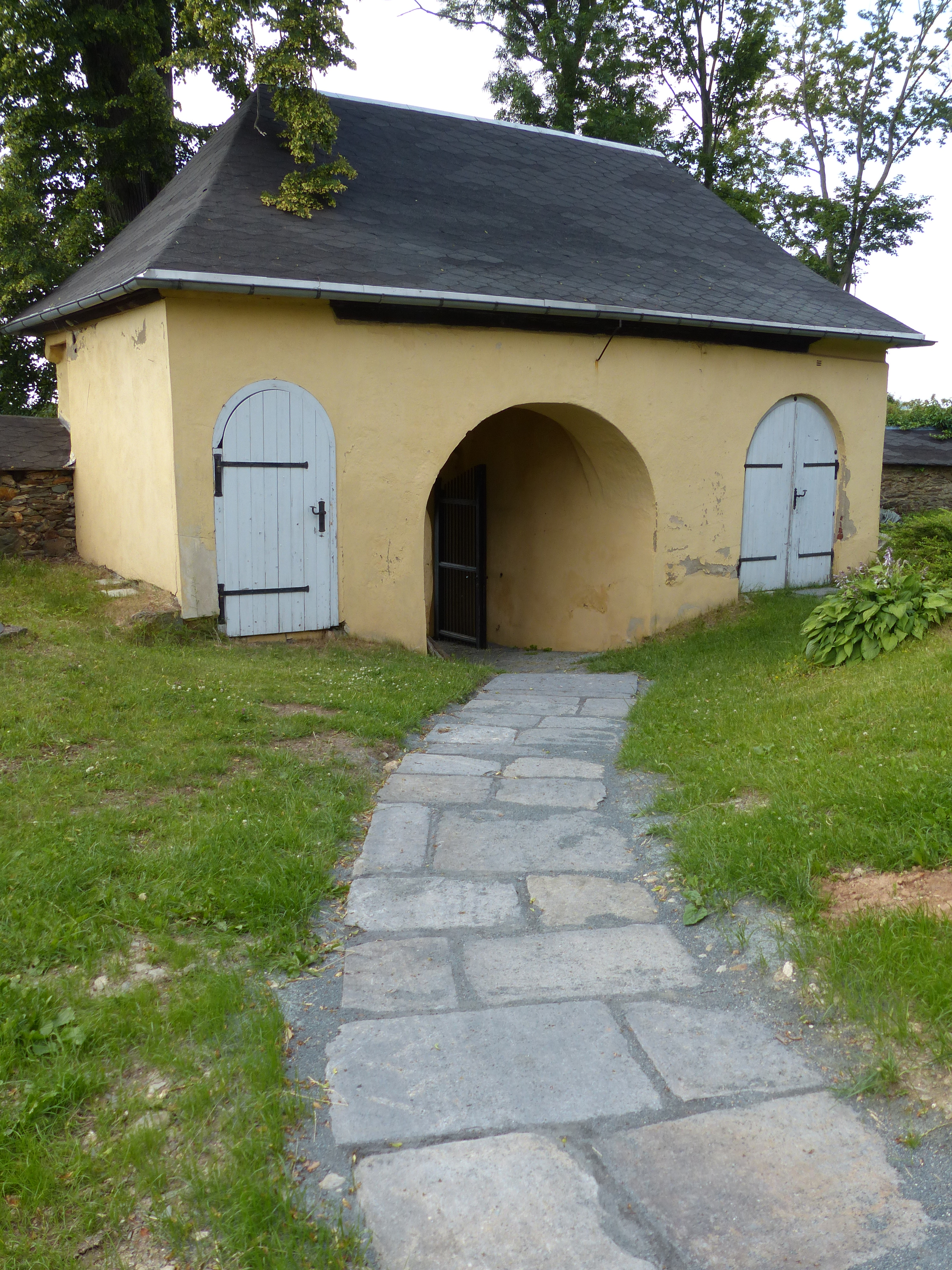 Bilderserie: Ansichten der Wehrkirche Triebel